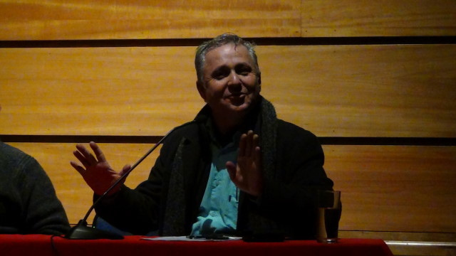 Marcel Claude en 2012.